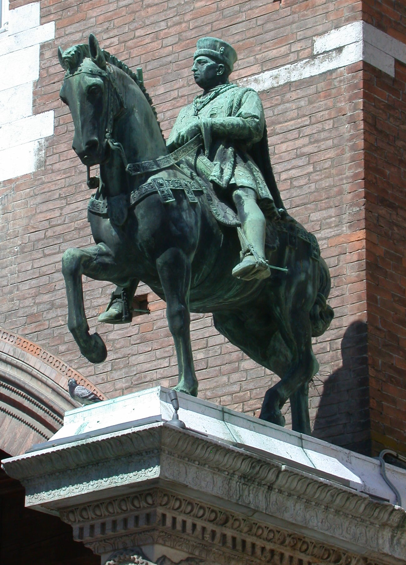 Copia novecentesca, opera di Giacomo Zilocchi, collocata di fronte al Palazzo del Municipio di Ferrara, del quattrocentesco monumento equestre in bronzo a Niccolò III d'Este, marchese d'Este.